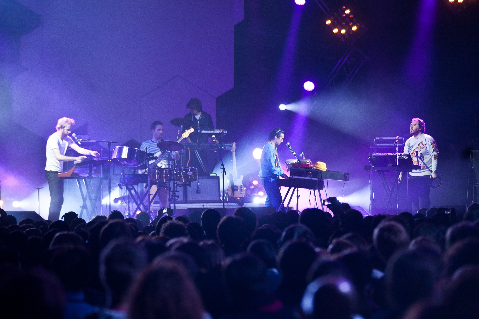 Группа Hot Chip на открытии Yota Space 2010